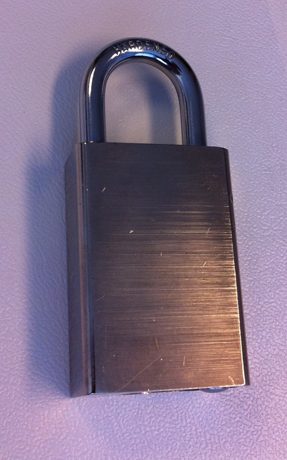 Hengelås med herdet bøyle